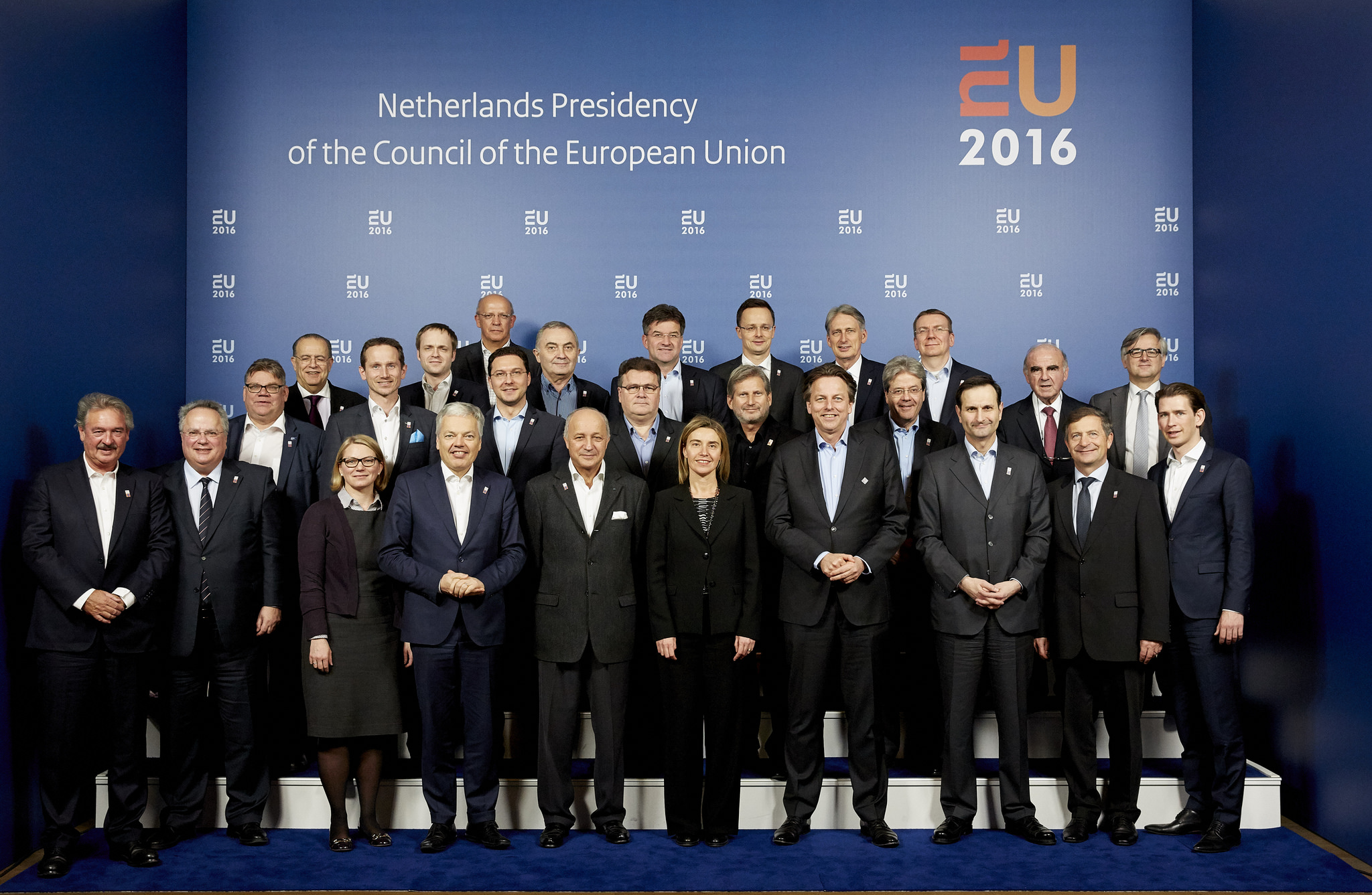 Ο Υπουργός Εξωτερικών κ. Ν. Κοτζιάς συμμετείχε στην άτυπη εξαμηνιαία συνάντηση «Gymnich», των Υπουργών Εξωτερικών των κρατών-μελών της Ευρωπαϊκής Ένωσης, η οποία έλαβε χώρα την Παρασκευή 5 και Σάββατο 6 Φεβρουαρίου, στο Άμστερνταμ.